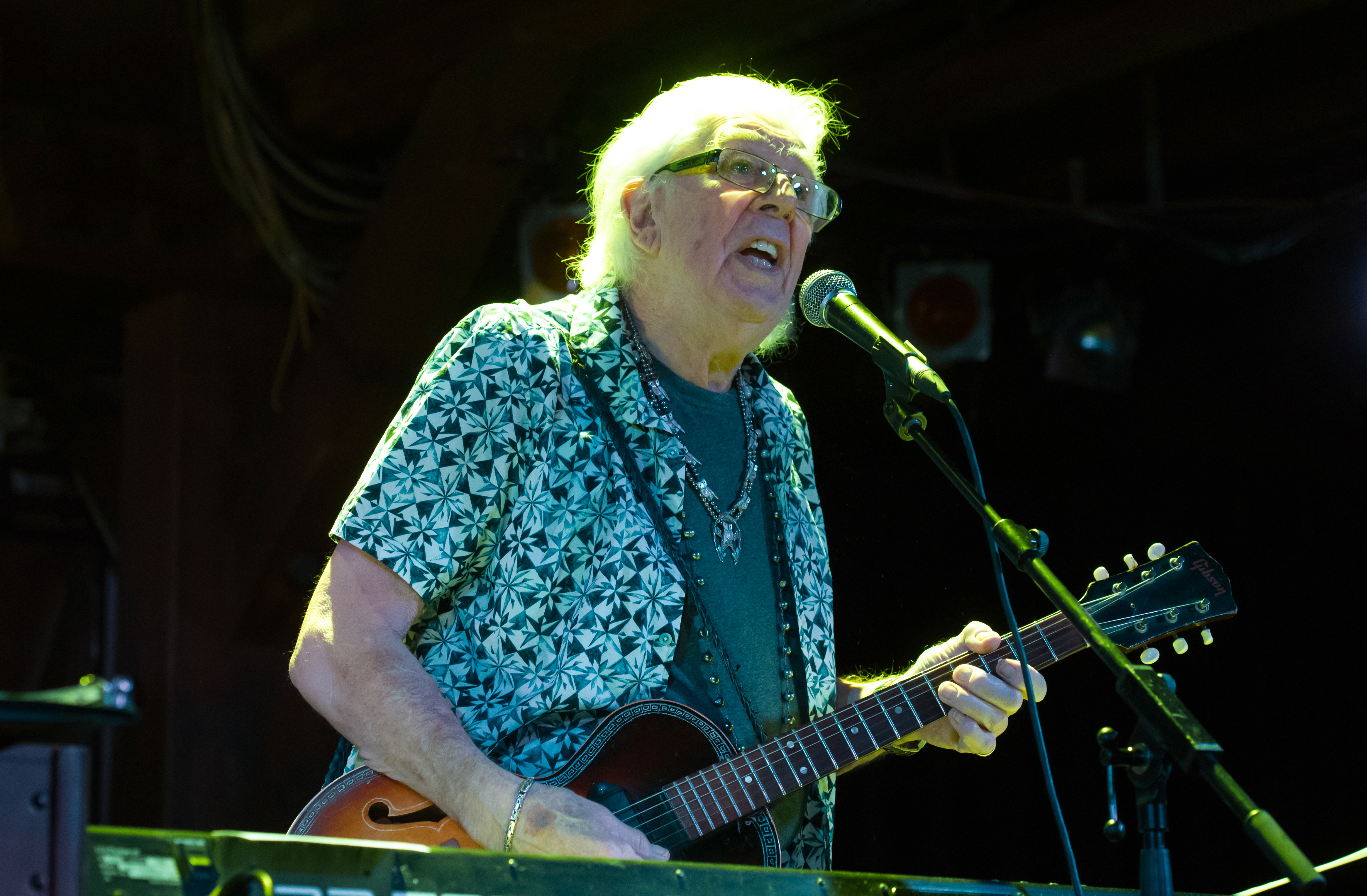 John Mayall in der Fabrik Hamburg 2017